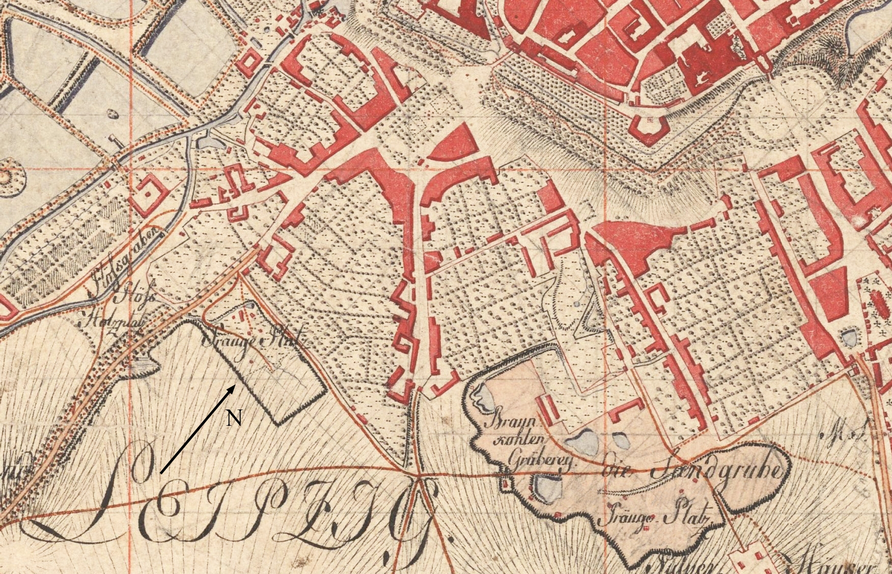 Ausschnitt aus Blatt 19 der Meilenblätter von Sachsen - Südöstliche Leipziger Vorstadt